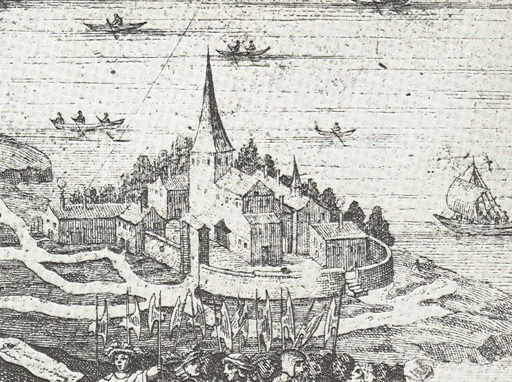 Mariamagdalenakapell, sthlm